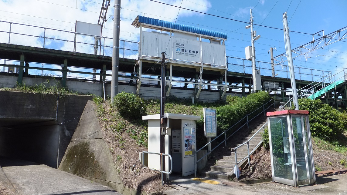 香川県坂出市府中町 讃岐府中駅 北側入り口